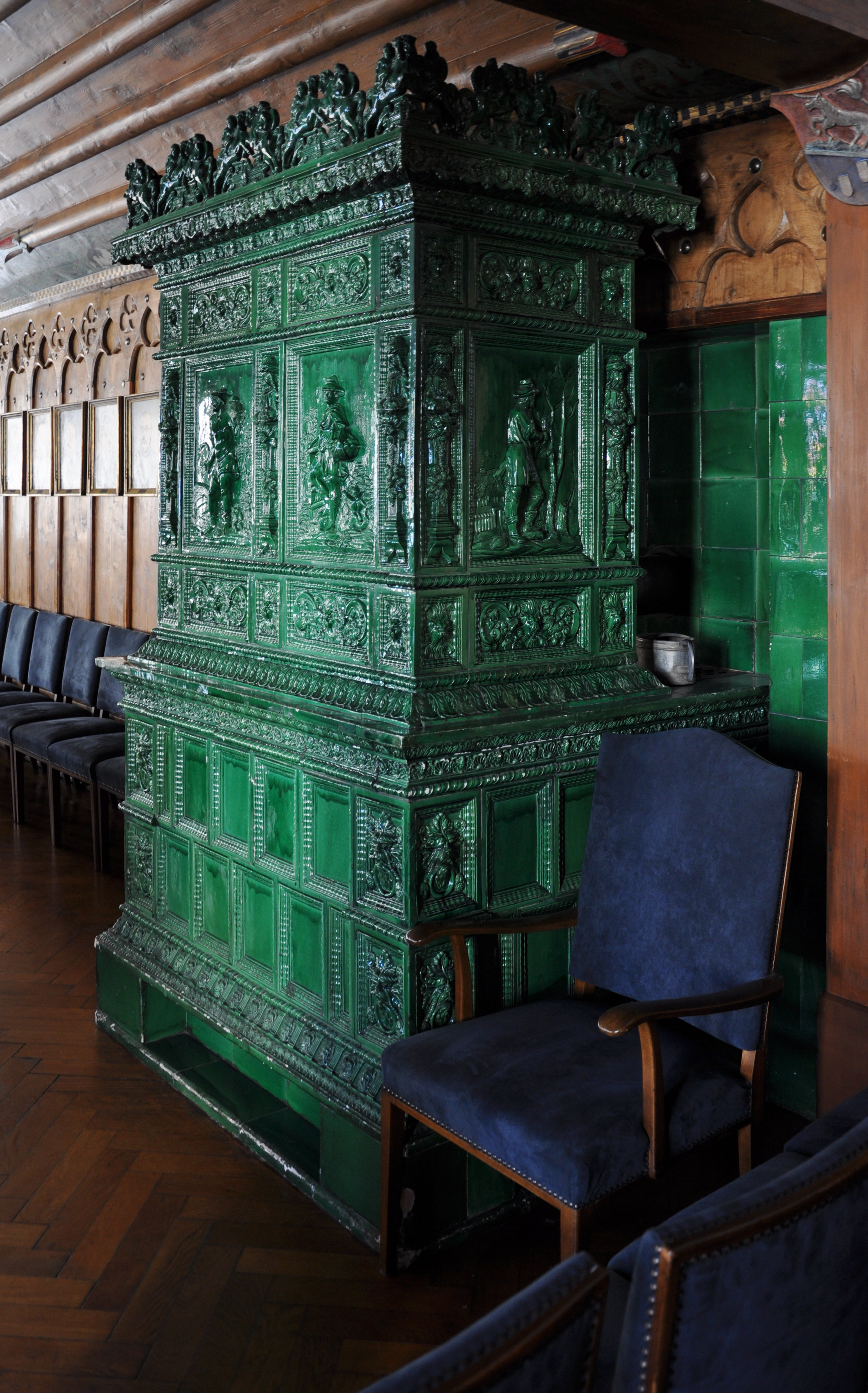 Ravensburg, Rathaus, Kleiner Sitzungssaal, Kachelofen